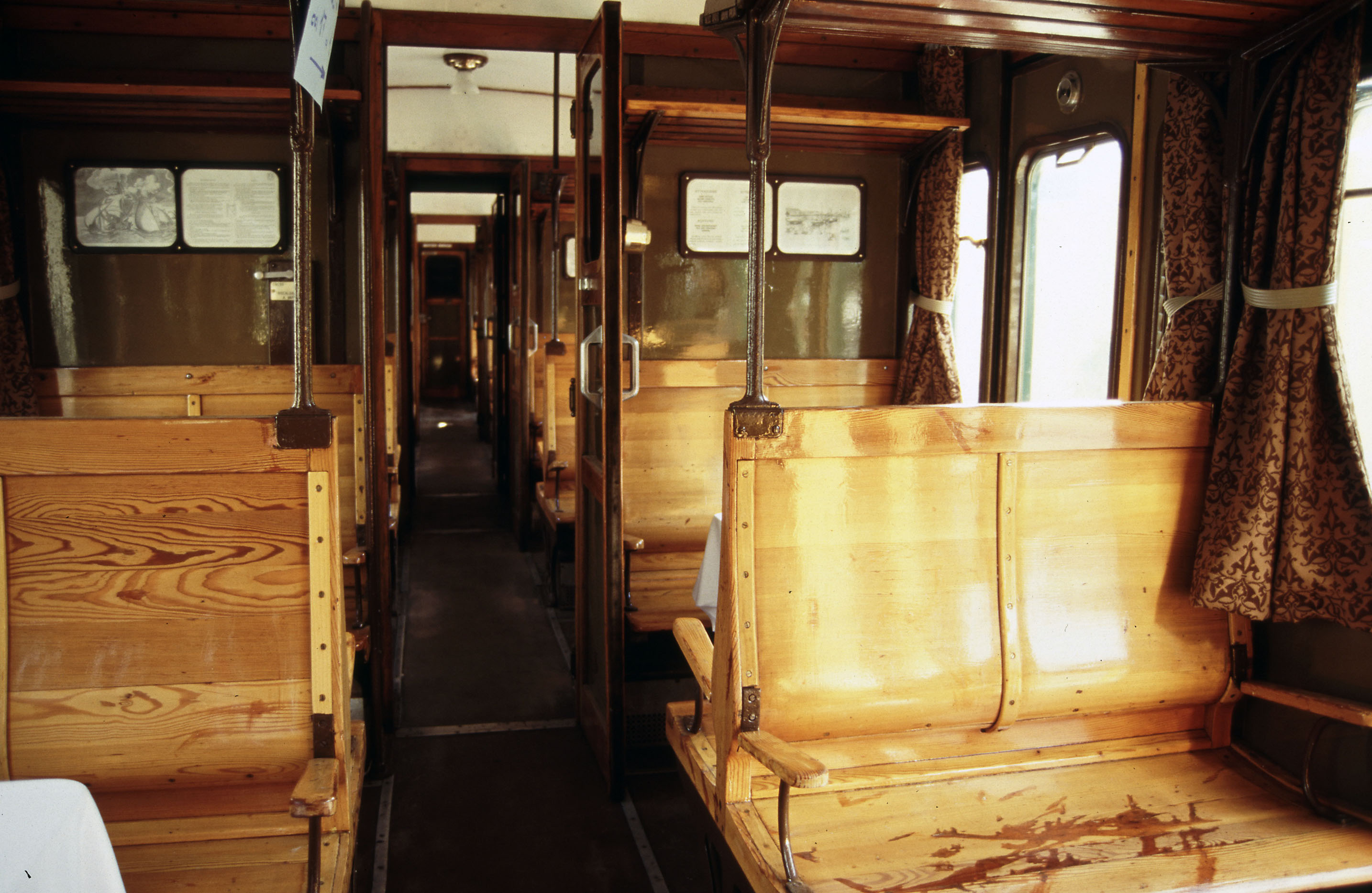 Interno della carrozza tipo 39117 restaurata, a Bologna, Dopolavoro Ferroviario, 1994, autore Sandro Baldi, Bologna Italia